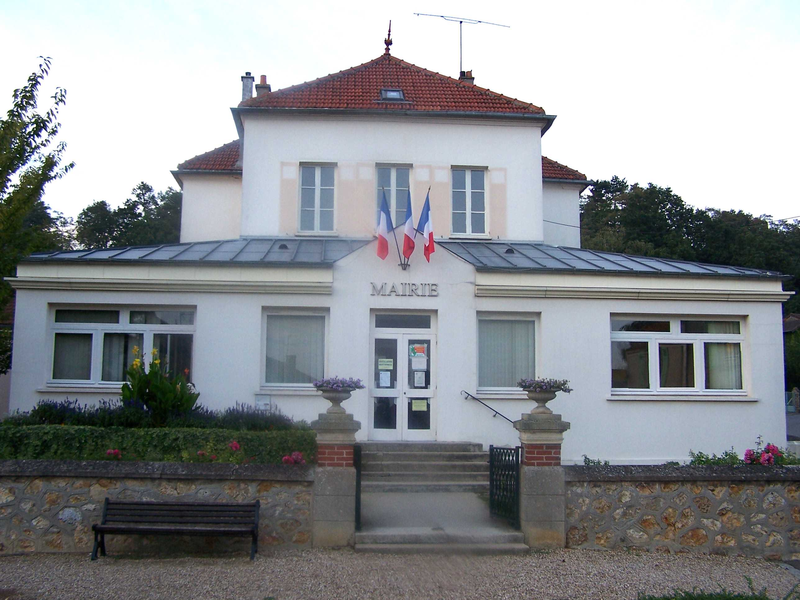 Mairie de Feucherolles (Yvelines, France)